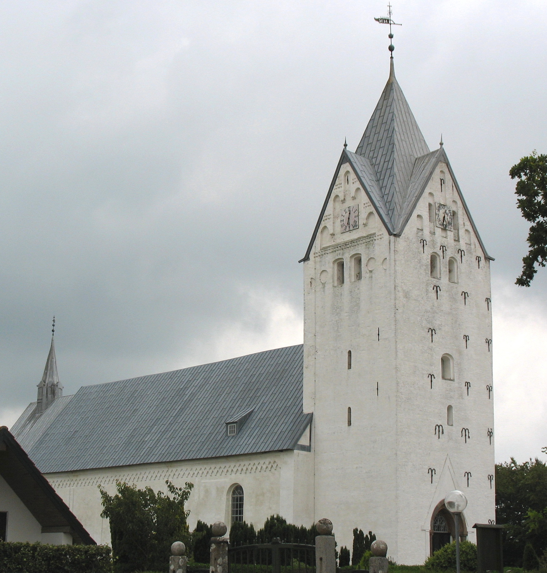 Brøns Kirke, Tønder Kommune